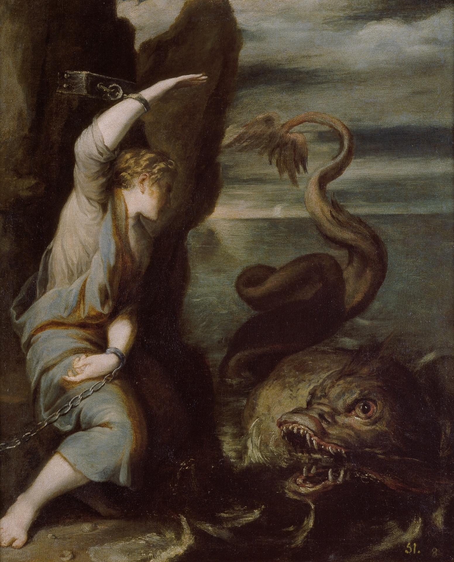 La obra representa a Andrómeda, esposa de Perseo.